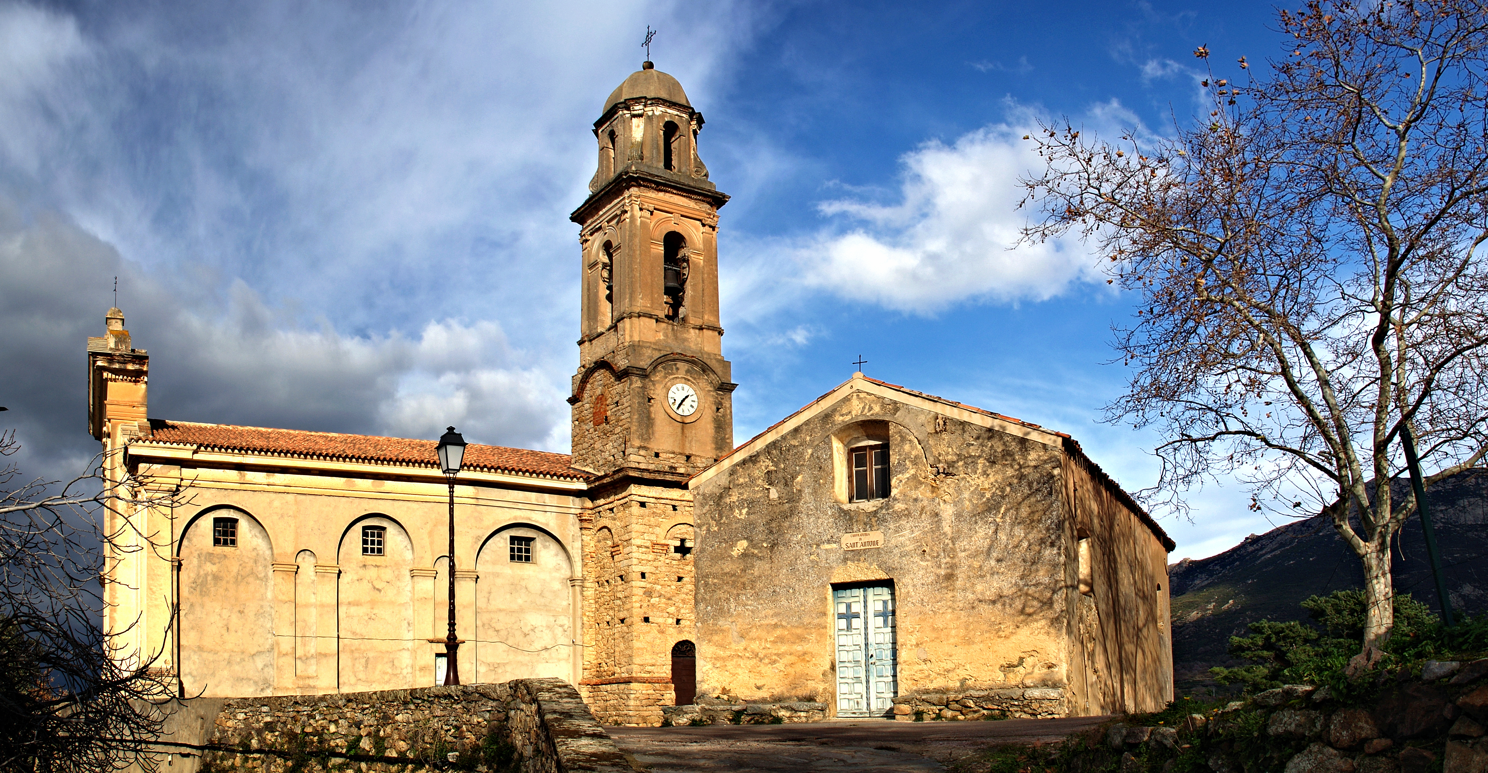 Feliceto, Balagne (Corse) - Église Saint-Nicolas. À sa droite, la chapelle de Confrérie